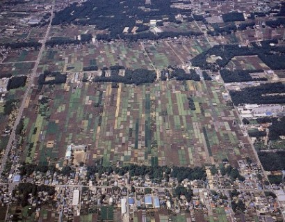 Santome Sｈｉｎｄｅｎ (三富新田)